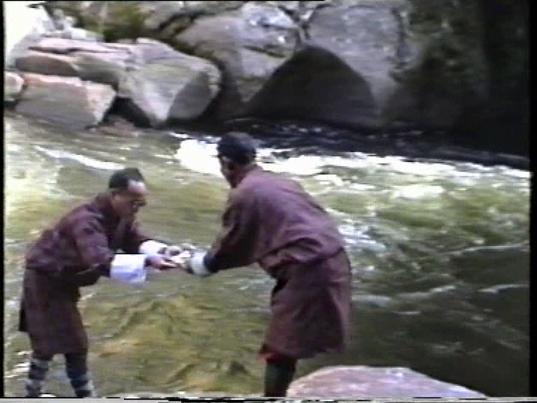 Паломничество к "бурлящему озеру" Мебарцо в Бутане